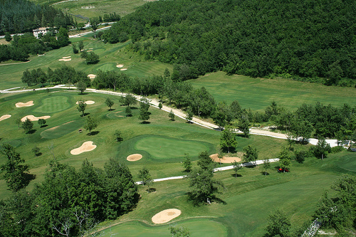 Golf dall'elicottero. alcune buche del san donato golf all'aquila-abruzzo fotografate dall'elicottero